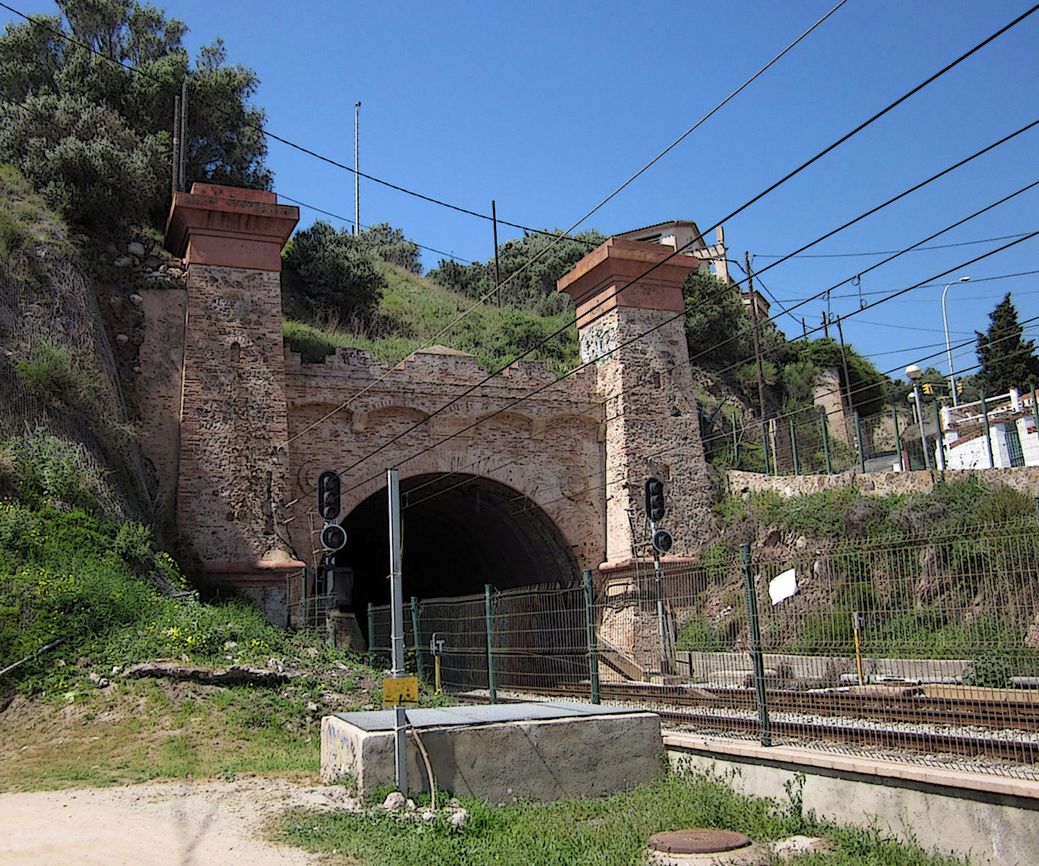 Embocadura norte del túnel de Montgat